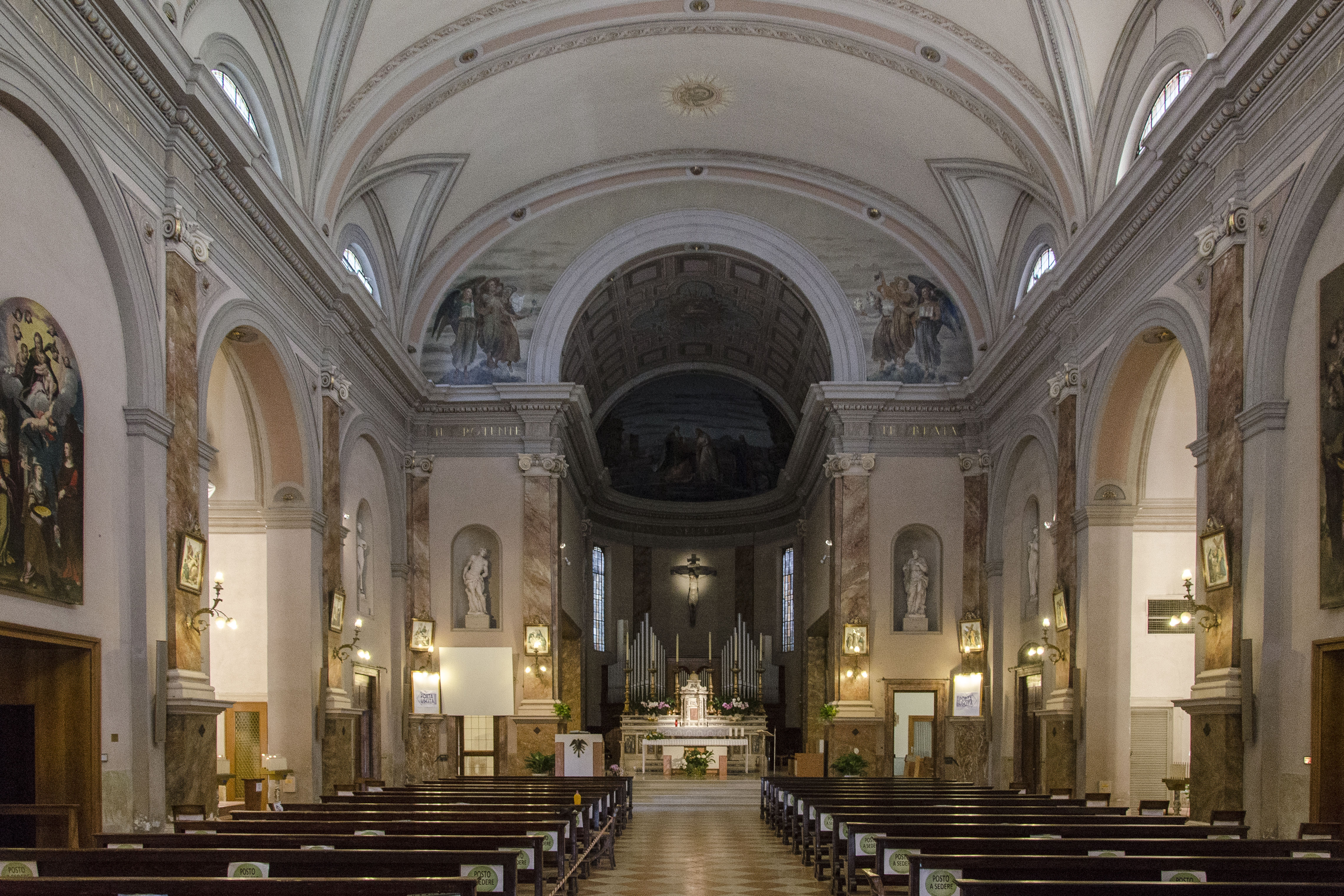 Chiesa di Santa Lucia Extra a Verona